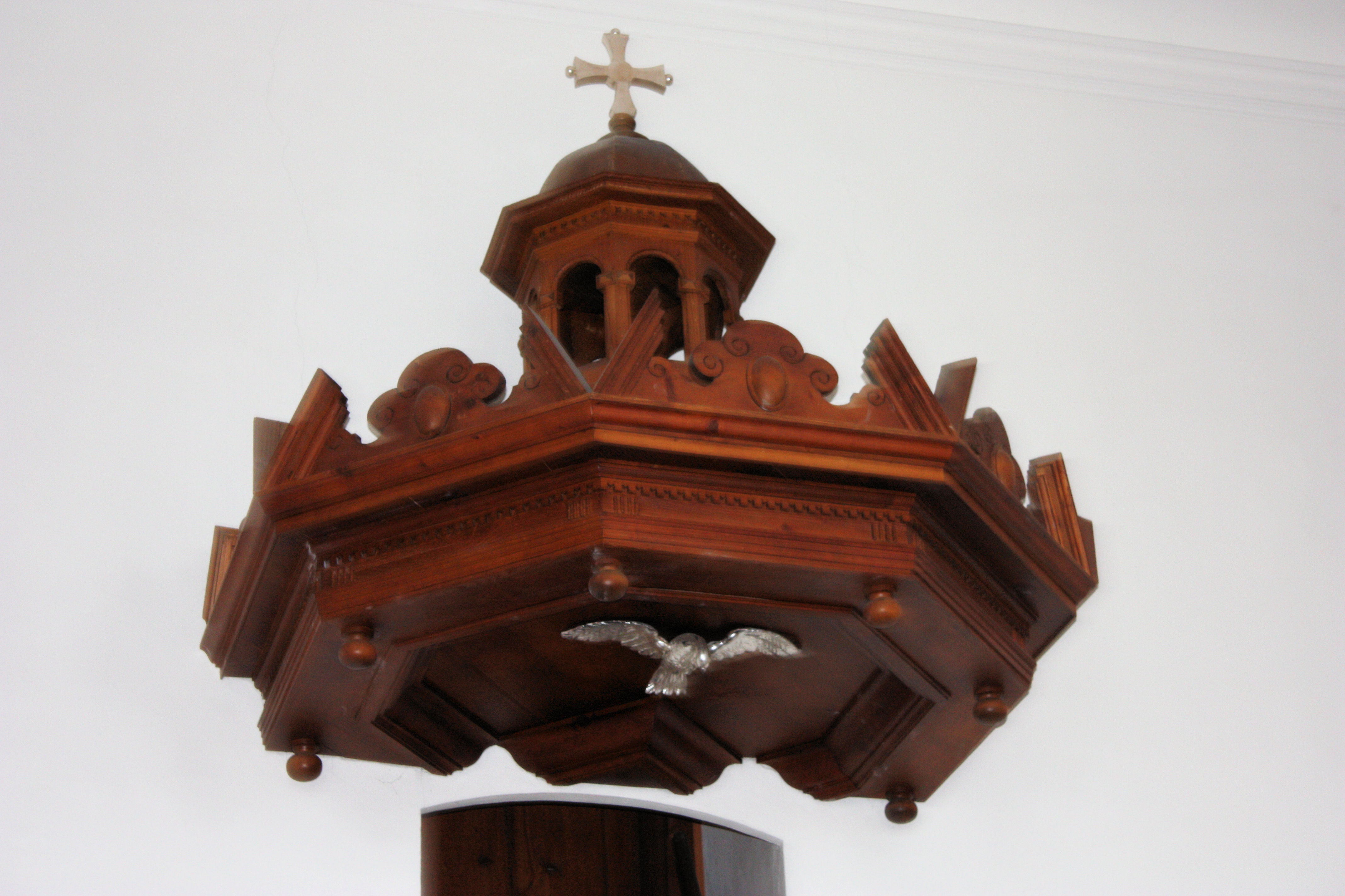 Mit einer Grabrotunde geschmückter Schalldeckel der Kanzel in der Propsteikirche in Wislikofen (AG).